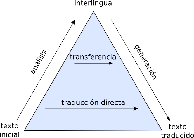 Pirámide traducción automática